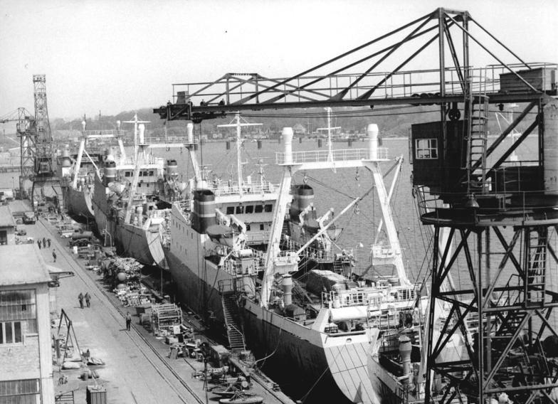 Stralsund, Volkswerft Stralsund, Ausrüstungskai, "Atlantik" Zentralbild Kohls 18.5.1967 50 Jahre Sowjetmacht Roststock: "Atlantiks" am Ausrüstungskal des VEB Volkswerft Stralsund, dessen Werktätige zu Ehren des 50. Jahrestages der Großen Sozialistischen Oktoberrevolution zur Weiterführung des sozialistischen Wettbewerbs aufgerufen haben." Information added by Wikimedia users.Volkswerft in Stralsund.